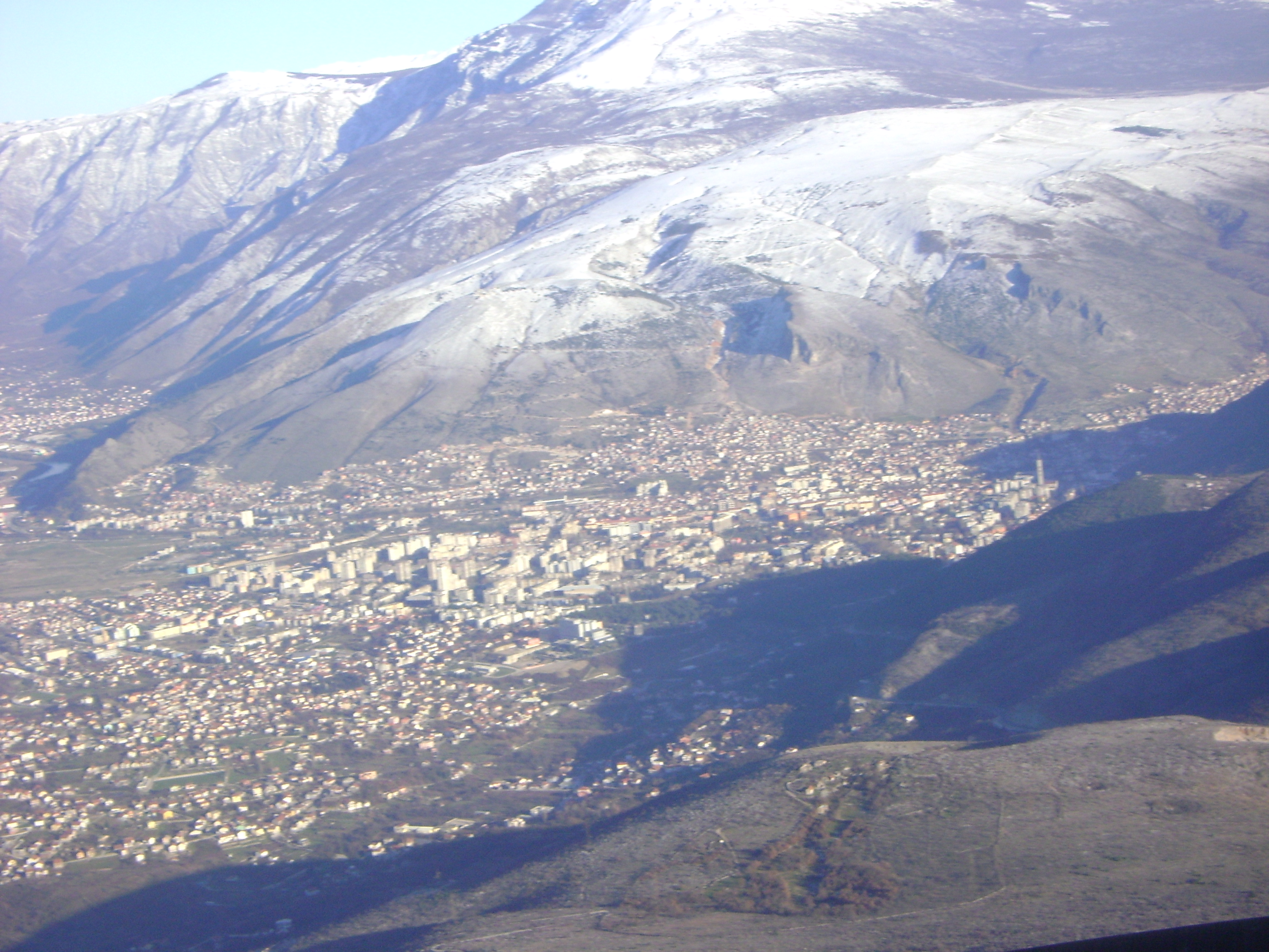 Mostar aus der Luft